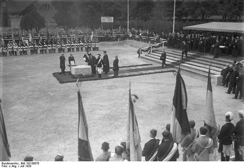 Die feierliche Grundsteinlegung des Erweiterungsbaues der Technischen Hochschule in Berlin! Der Rektor der Technischen Hochschule Prof.Dr.Ing. Drawe vollzieht die ersten drei Hammerschläge.